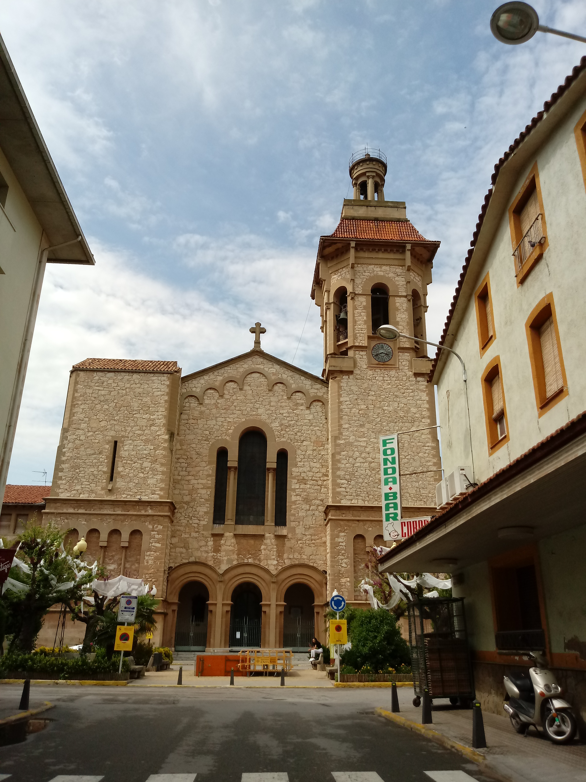 Fachada principal de la Iglesia Románica de Santa María de Artés, en la comarca del Bages, en la provincia de Barcelona.